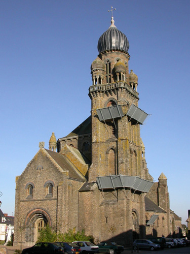 Patrimoine de Corps-Nuds